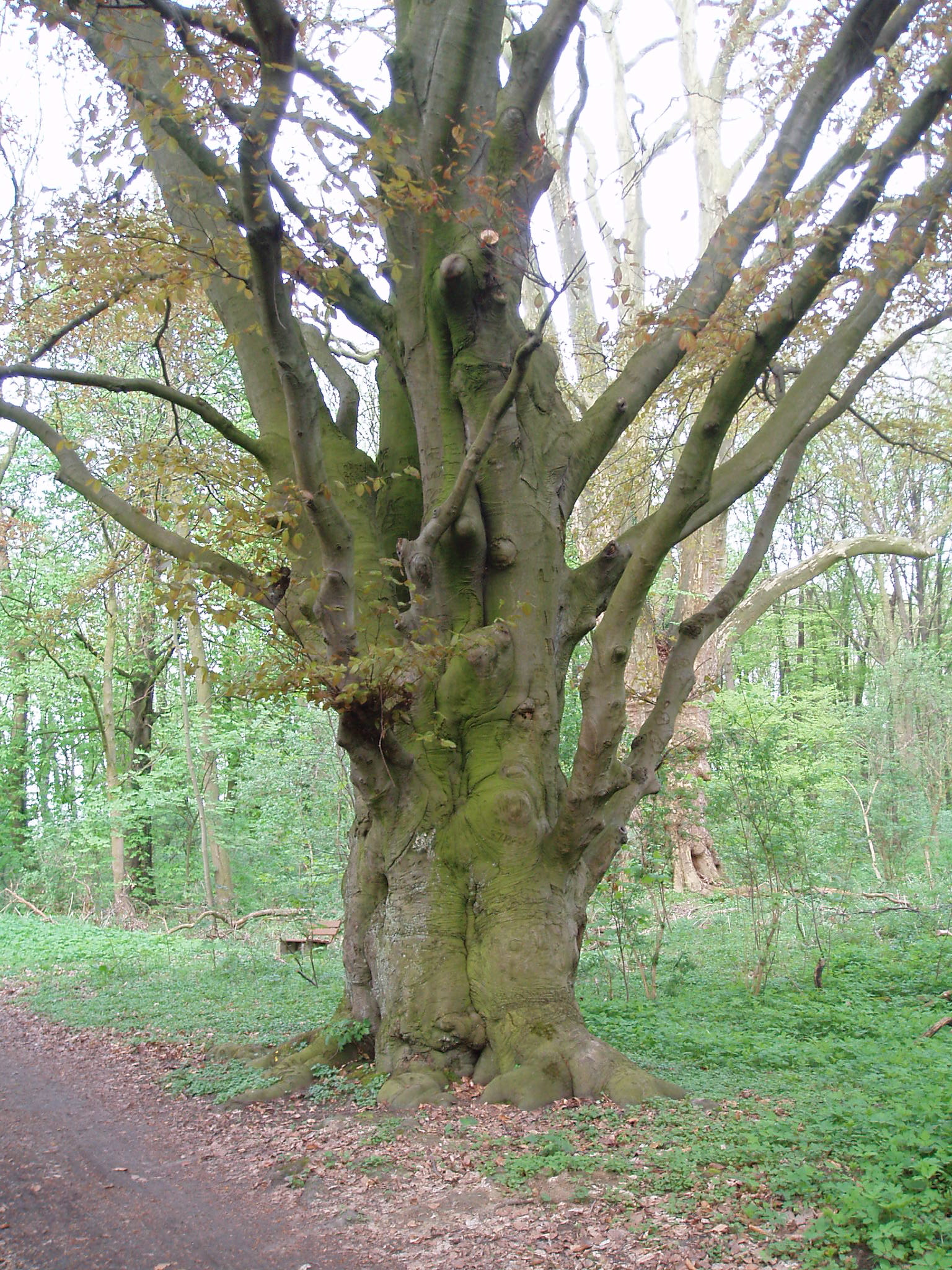 Blutbuche, als Naturdenkmal geschützt, an einem zugeschütteten Gräftenarm des ehemaligen Wasserschlosses Haus Heyde; Bereich im Naturschutzgebiet „Uelzener Heide, Mühlhauser Mark“